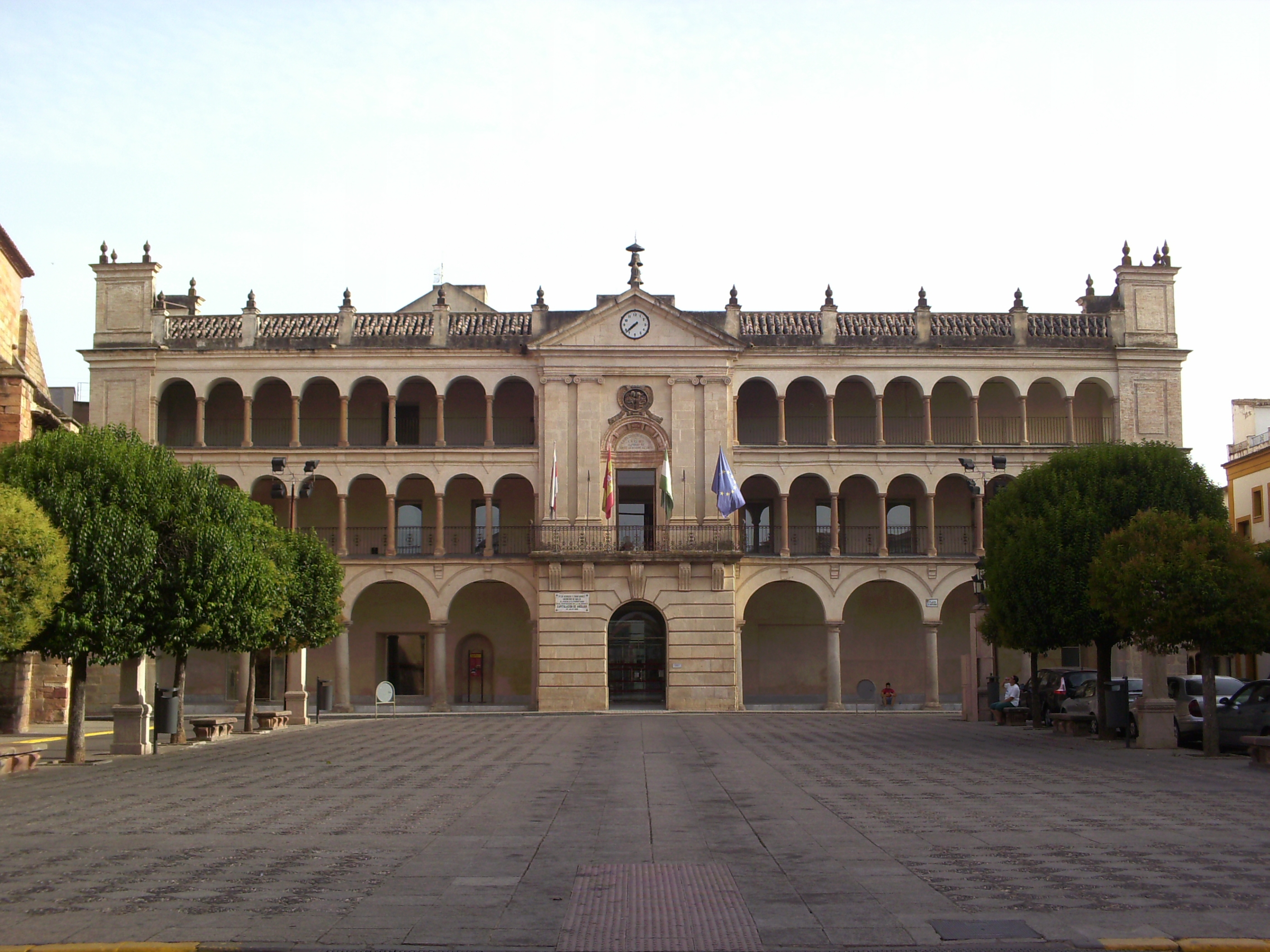 Fachada del Ayuntamiento de Andújar.